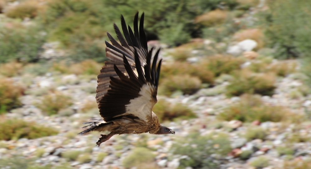 Himalayan Griffon Vulture Gyps himalayensis